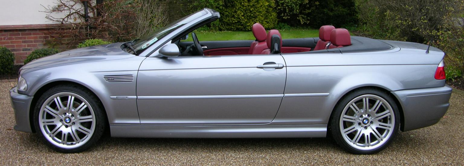 BMW M3 Cabriolet